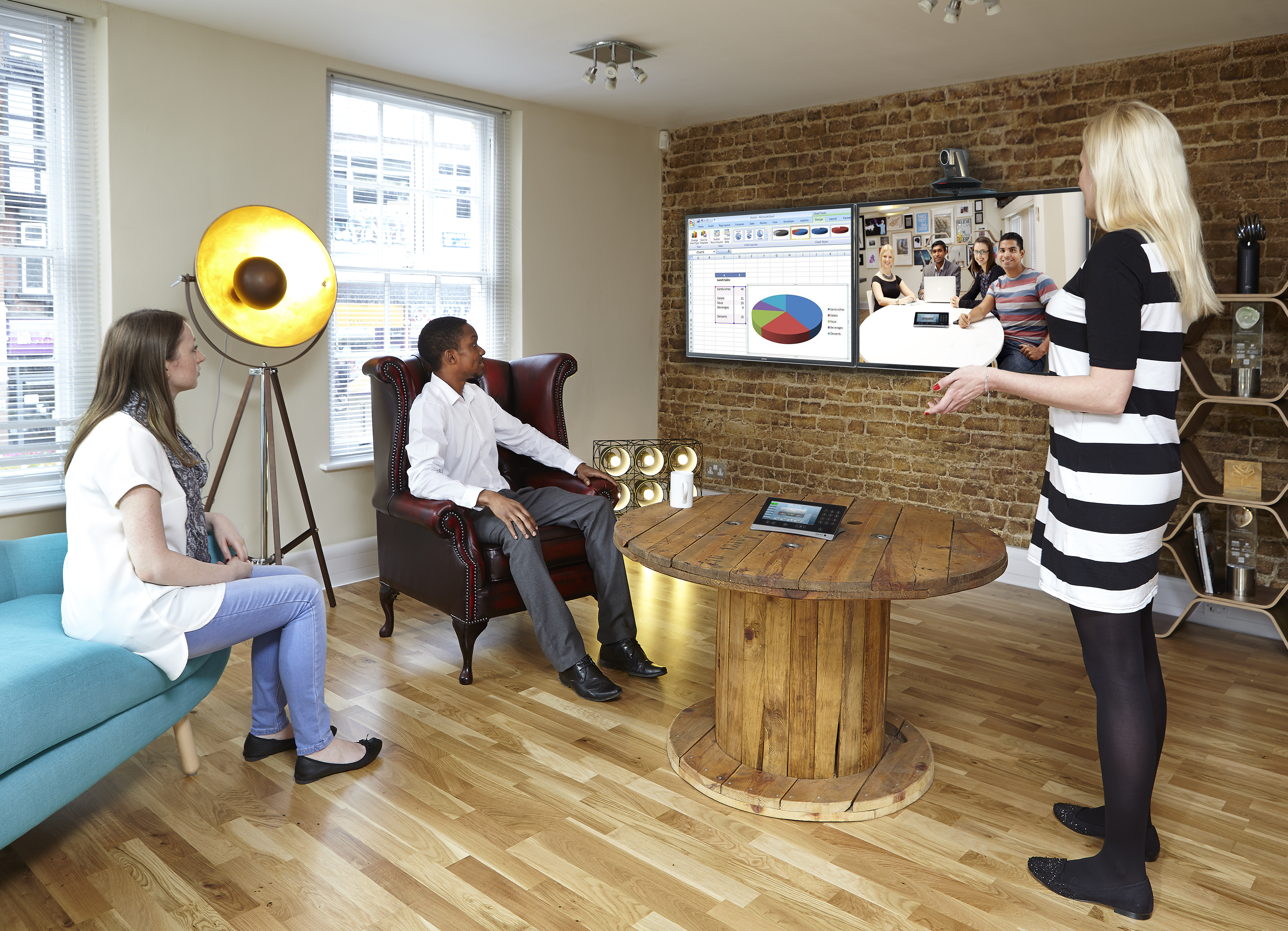 Système de visioconférence à double écran avec caméra PTZ, dalle tactile, codec et micro StarLeaf GT Mini 3330